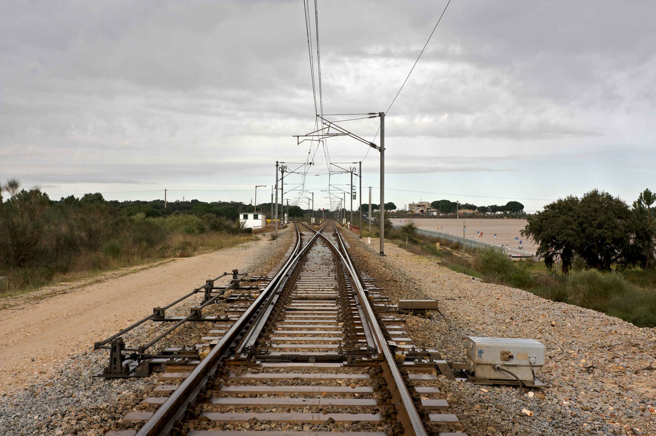 Via férrea: Concordância de Poceirão [PK 8] • Linha do Sul [PK 47] Local: Águas de Moura Data e hora: 24 de Janeiro de 2011 [13h52] Sentido: Poceirão • Lisboa